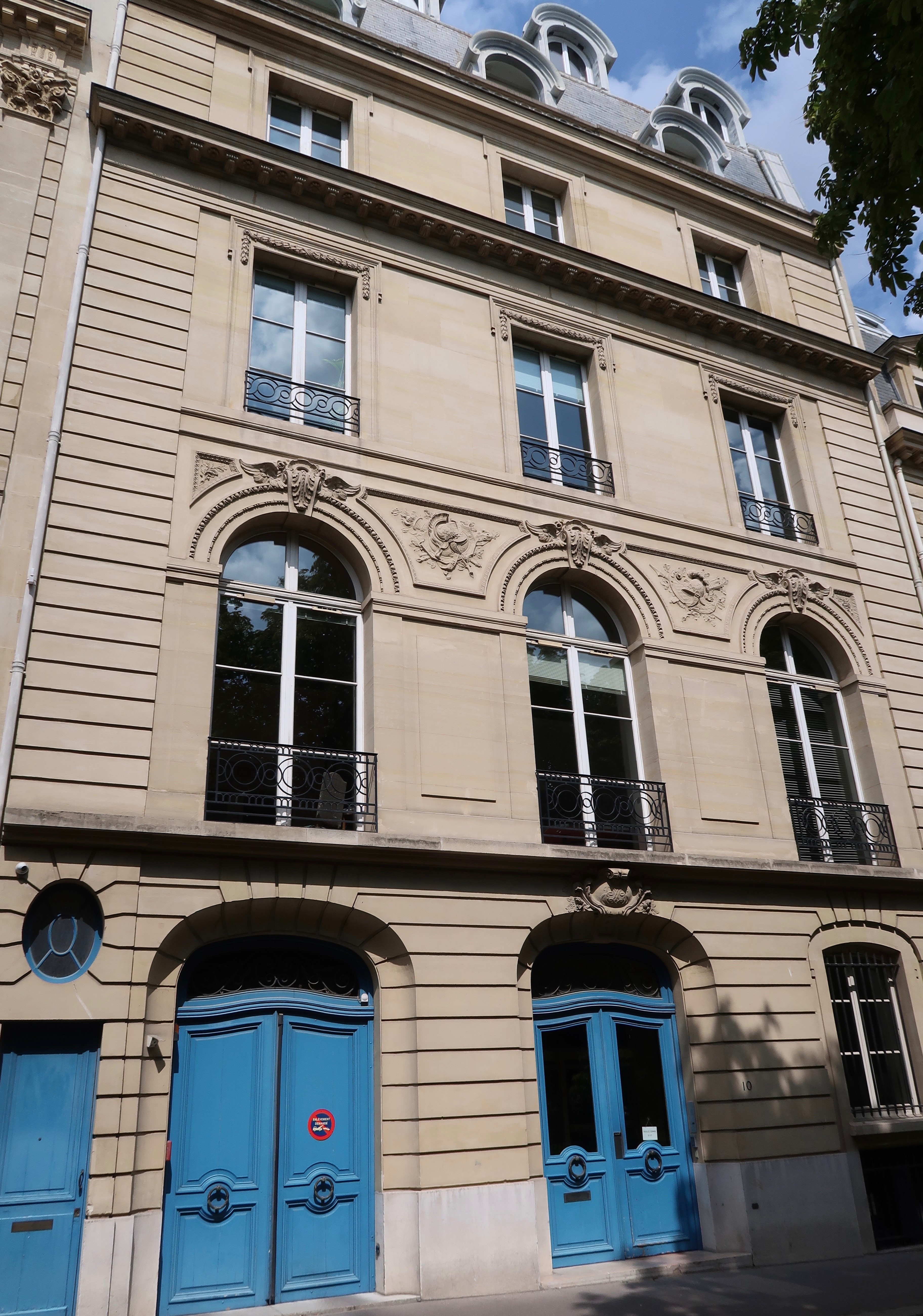 Hôtel de Brantes, 10 place des États-Unis (Paris, 16e).